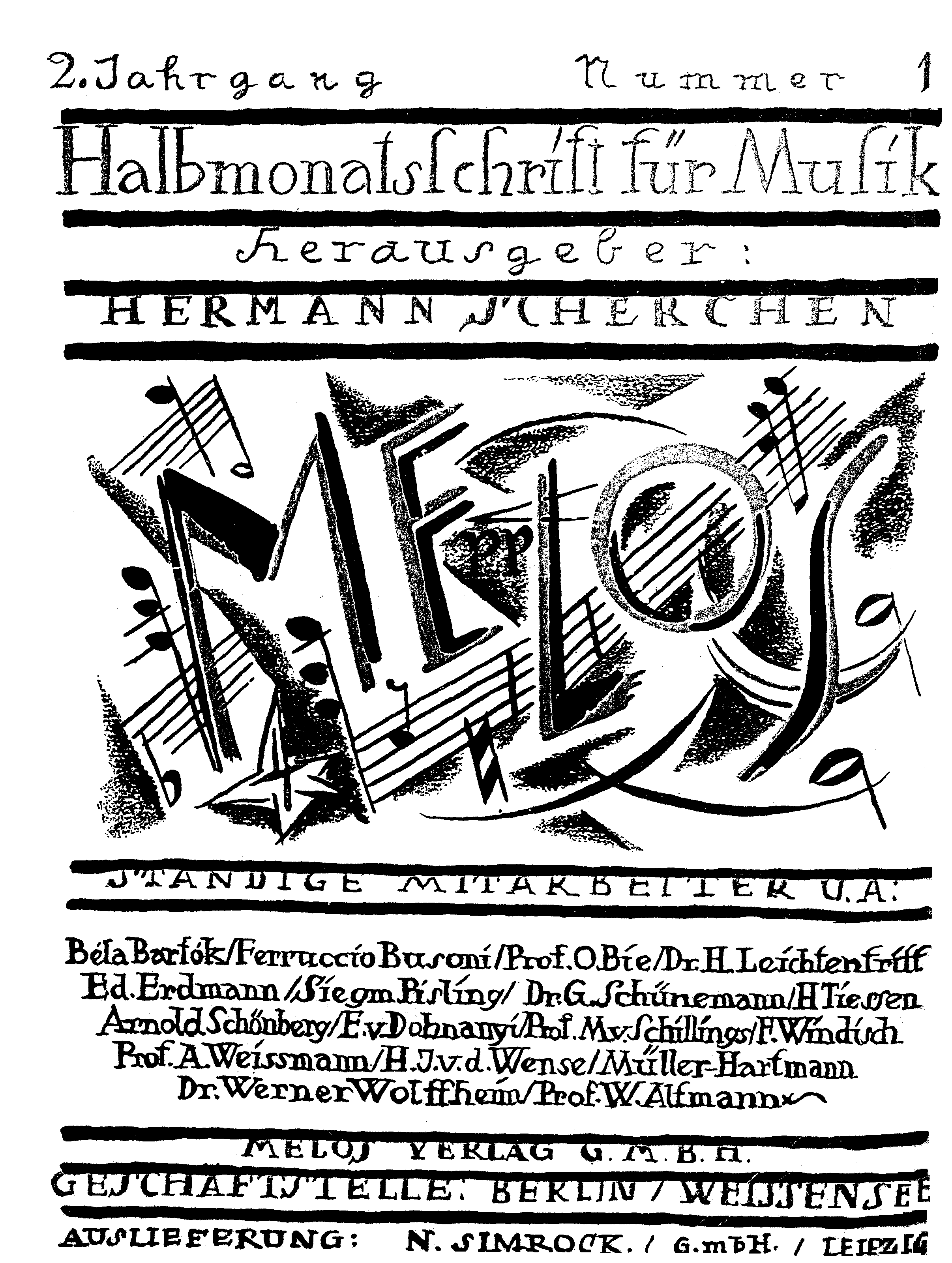 Titelseite der Zeitschrift / Title page of the periodical